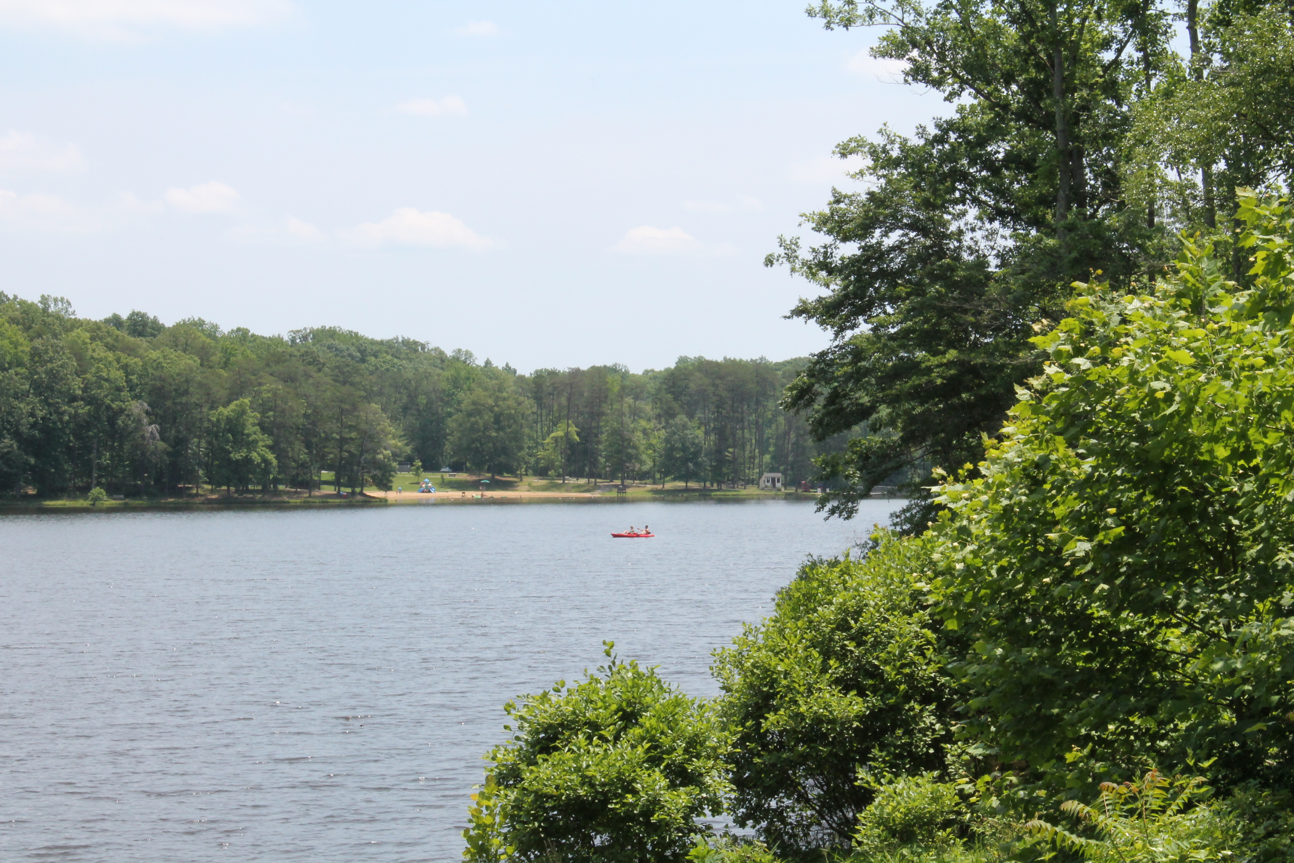 Bear Creek Lake. zar